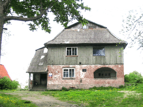 Beschreibung: Kassuben, das Pfarrhaus und Reste der heutigen zerstörten Kirche Quelle: Bild selbst erstellt Datum: 03.Juli.1993 Autor: Torsten Langhoff